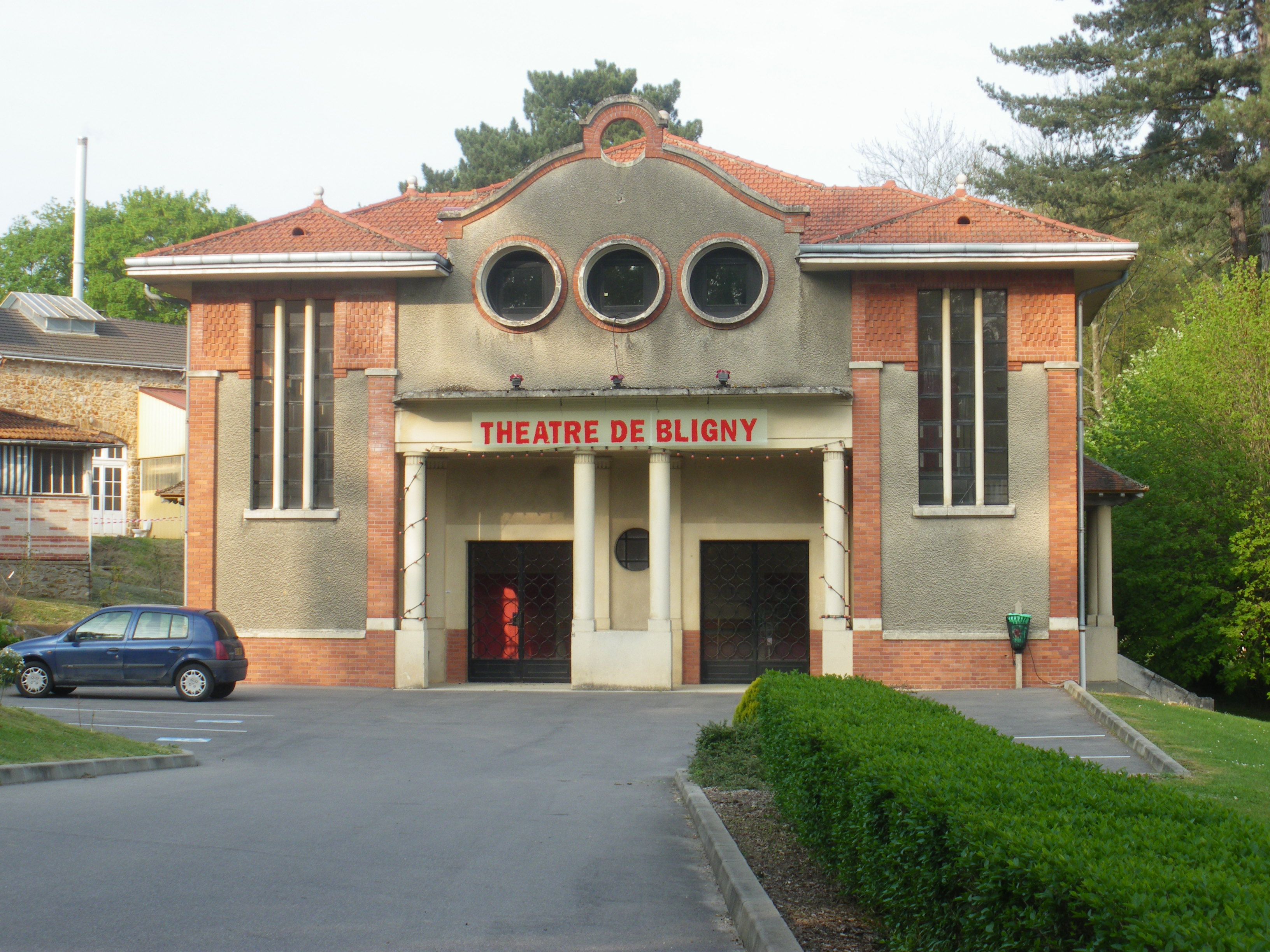 Théatre de Bligny, situé dans le parc du centre hospitalier, Fontenay les Briis, Essonne, France